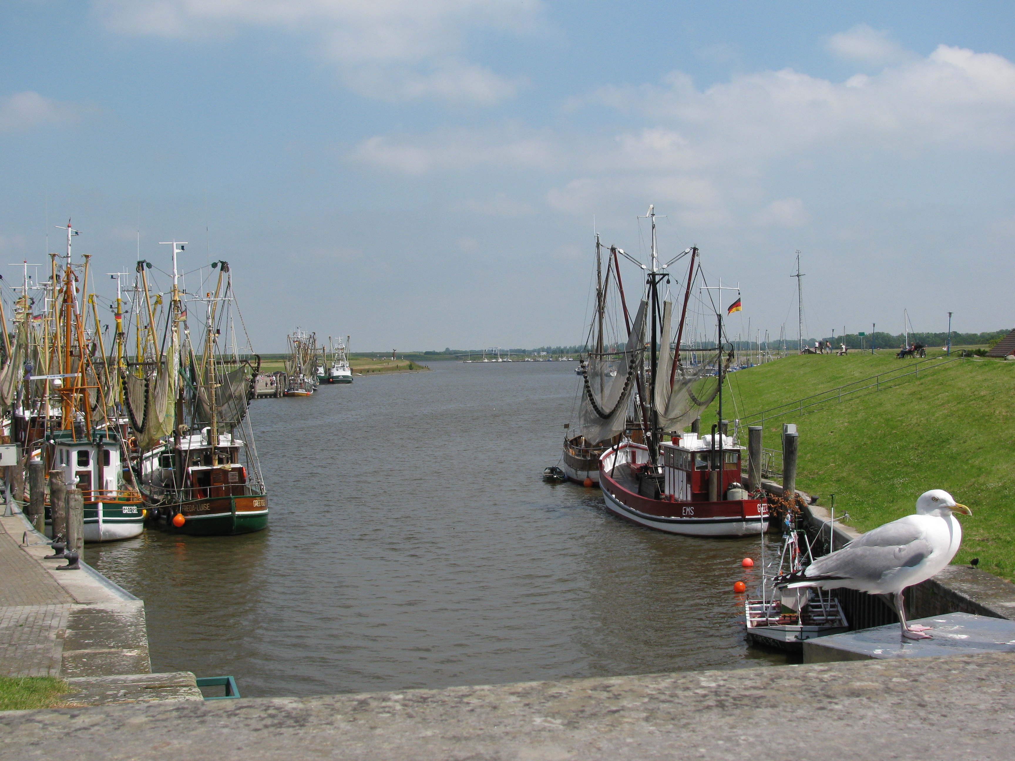 Hafen von Greetsiel mit Kutterflotte